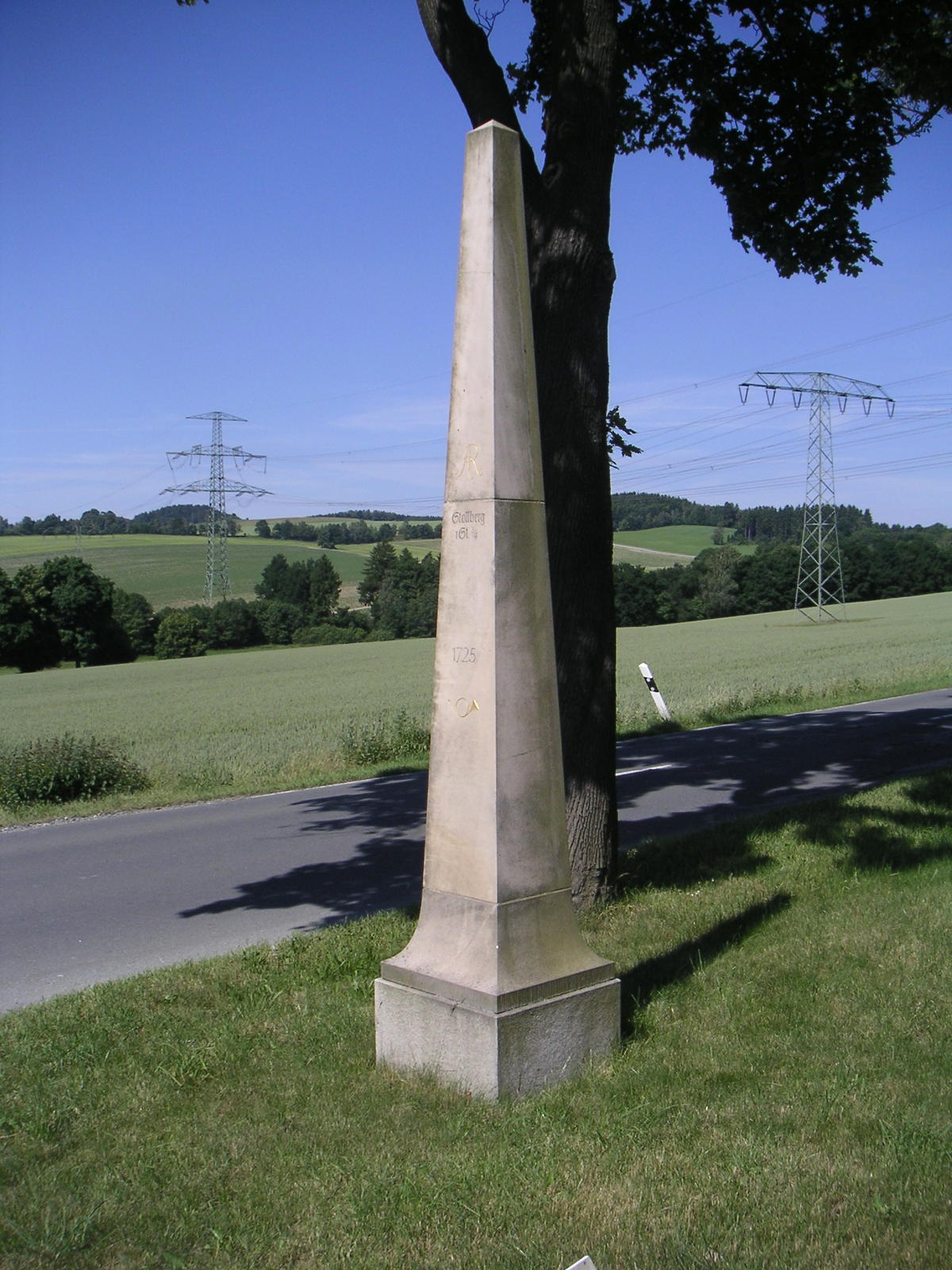 Kursächsische Ganzmeilensäule von 1725 in Zwönitz am Ortsausgang an der Straße nach Stollberg